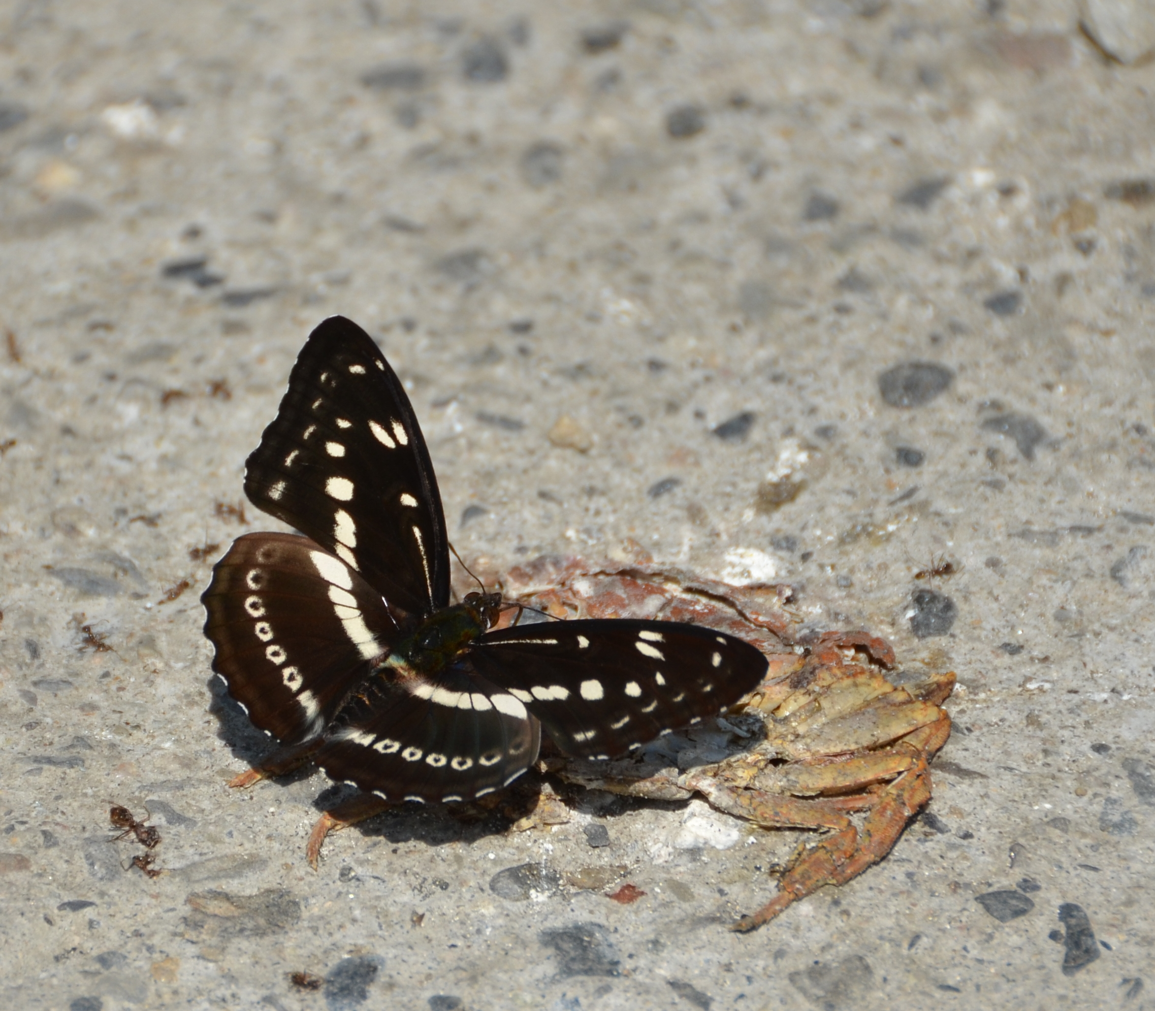 342白圈三線蝶2(游釗敏攝)